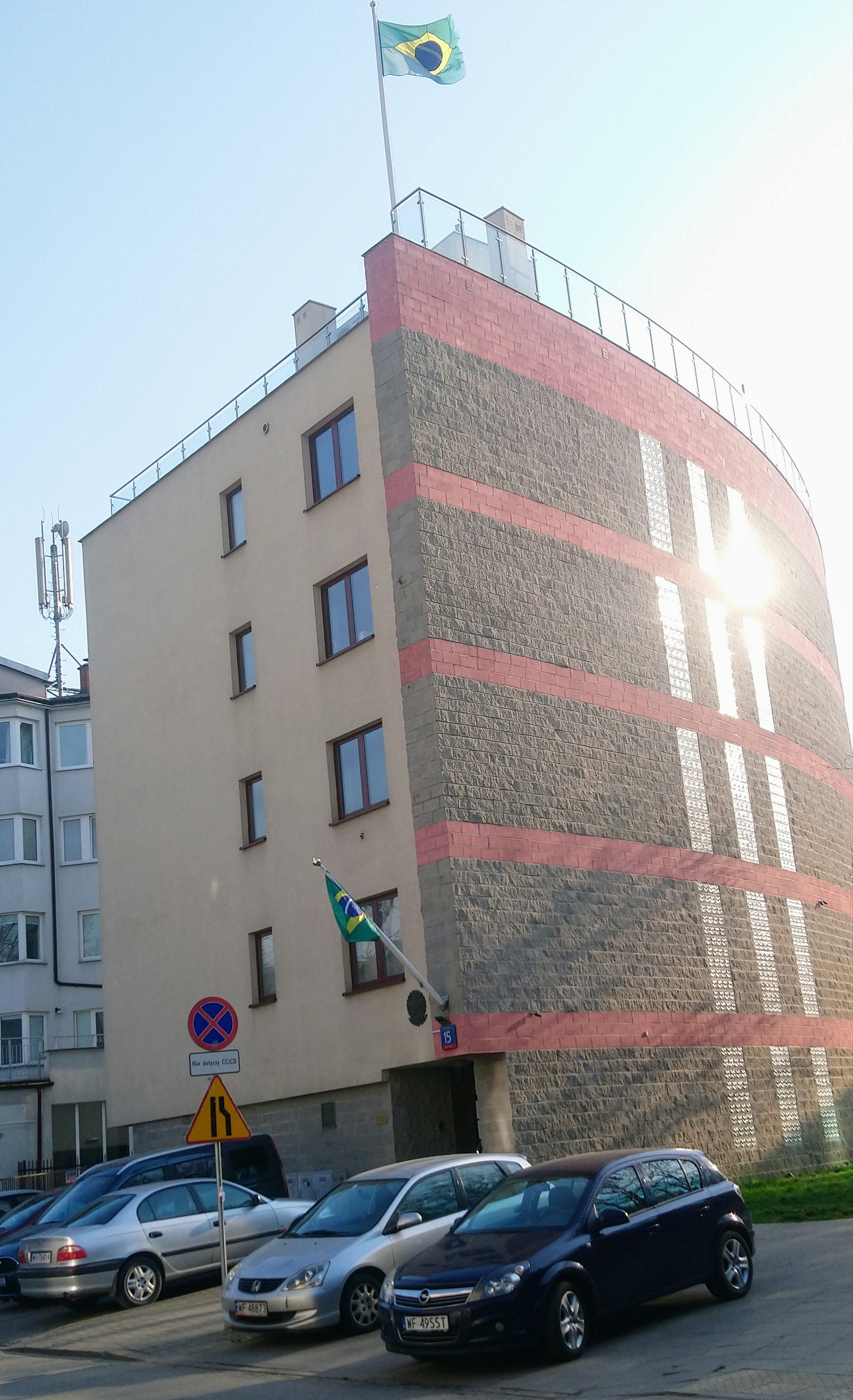 Ambasada Brazylii